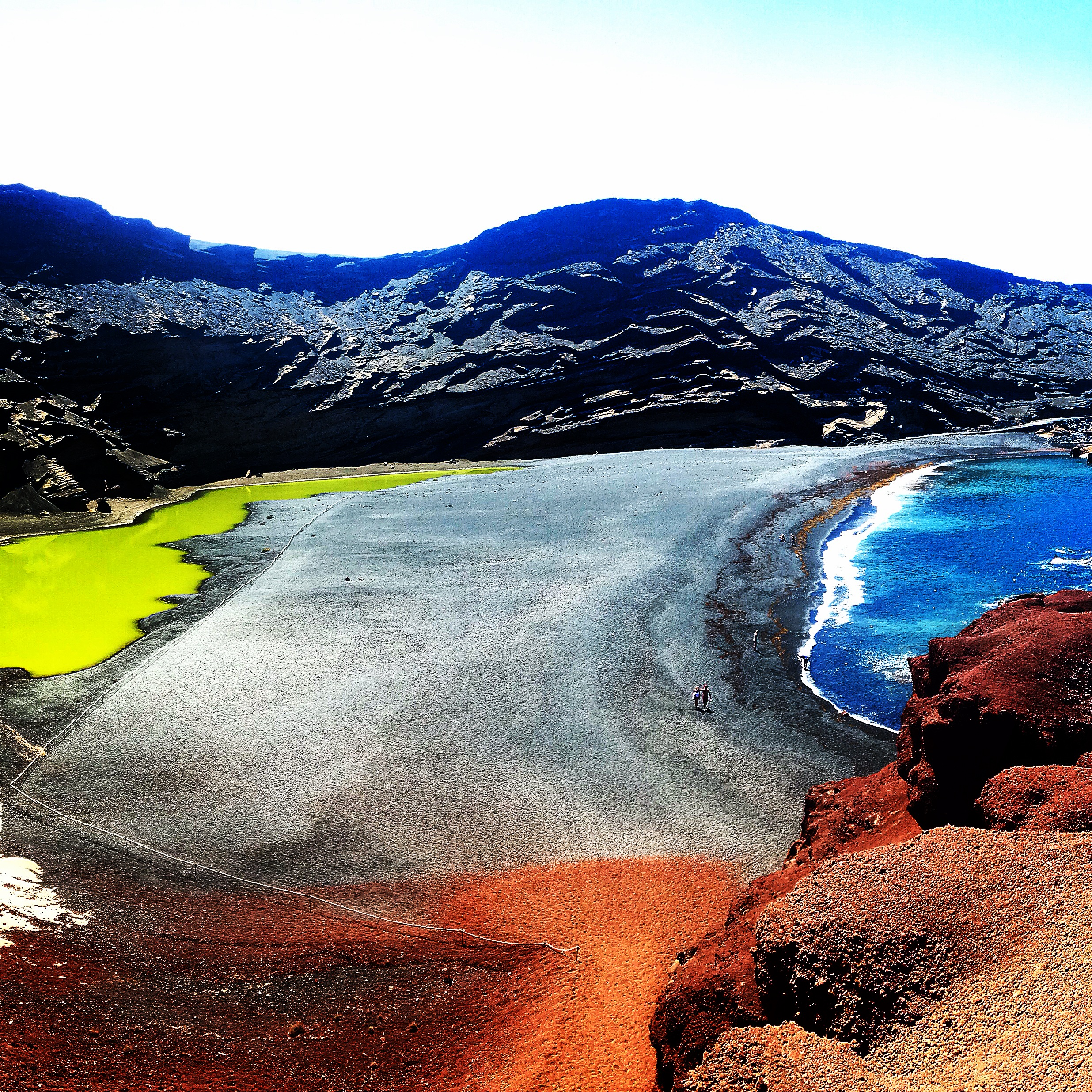 Charco verde en septiembre de 2014